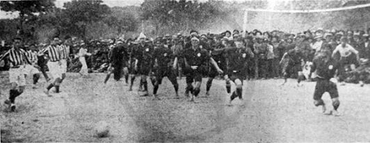 Partido de FBC melgar VS FBC Aurora 1919